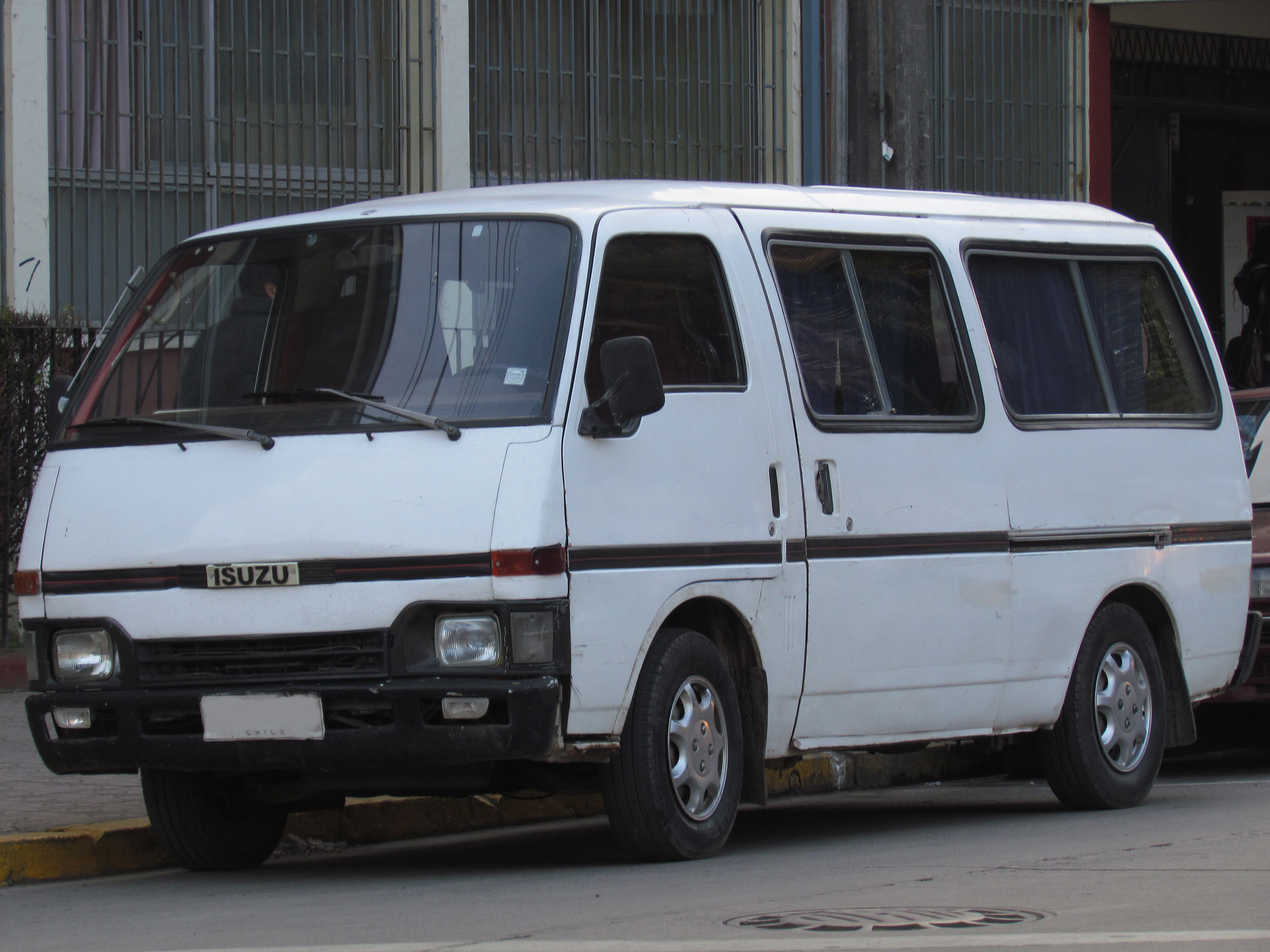 Isuzu WFR 1990